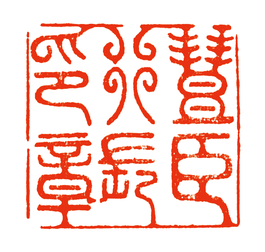 『集古十種 』より、豊臣行長印。